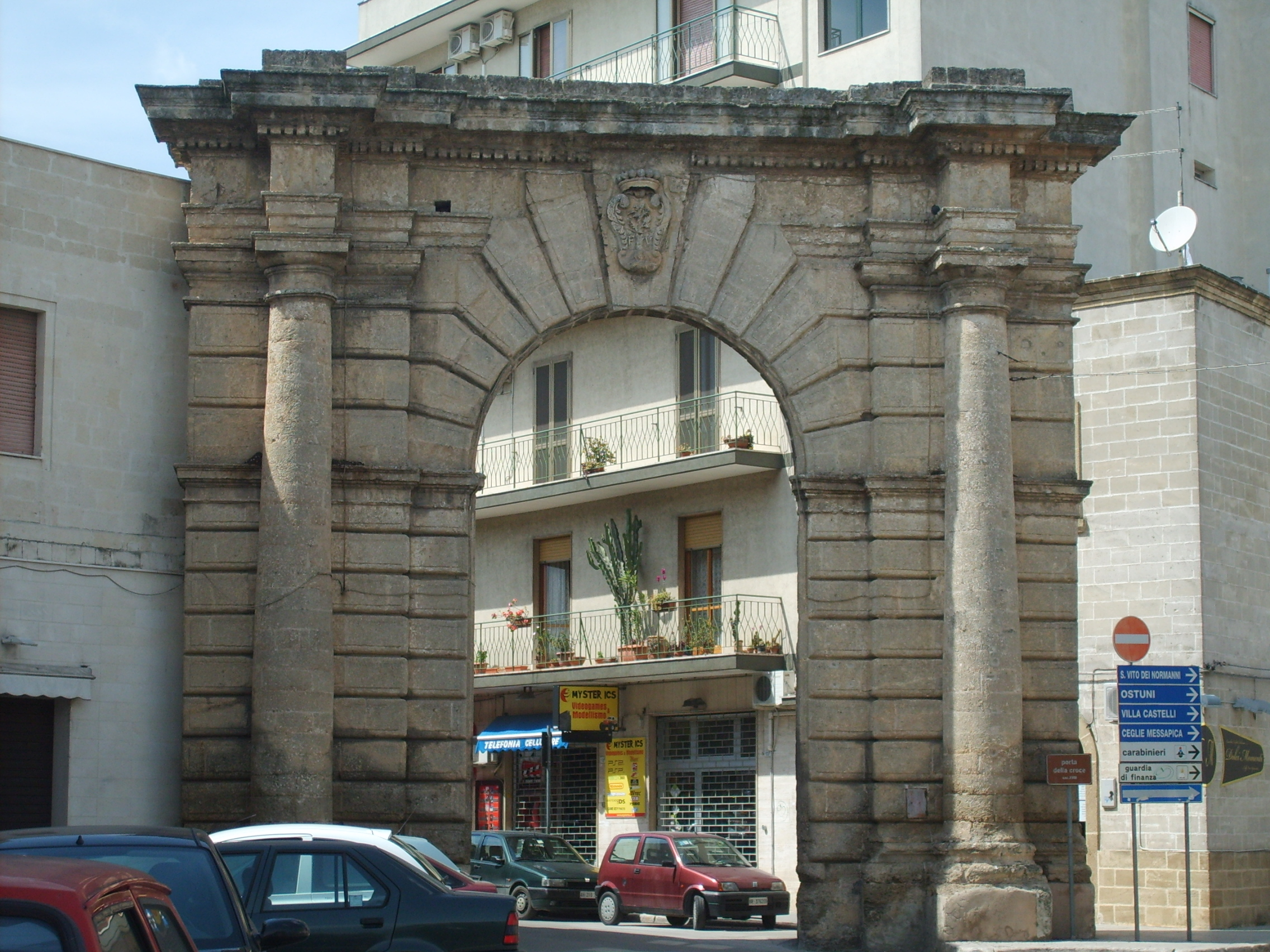 Porta della Croce